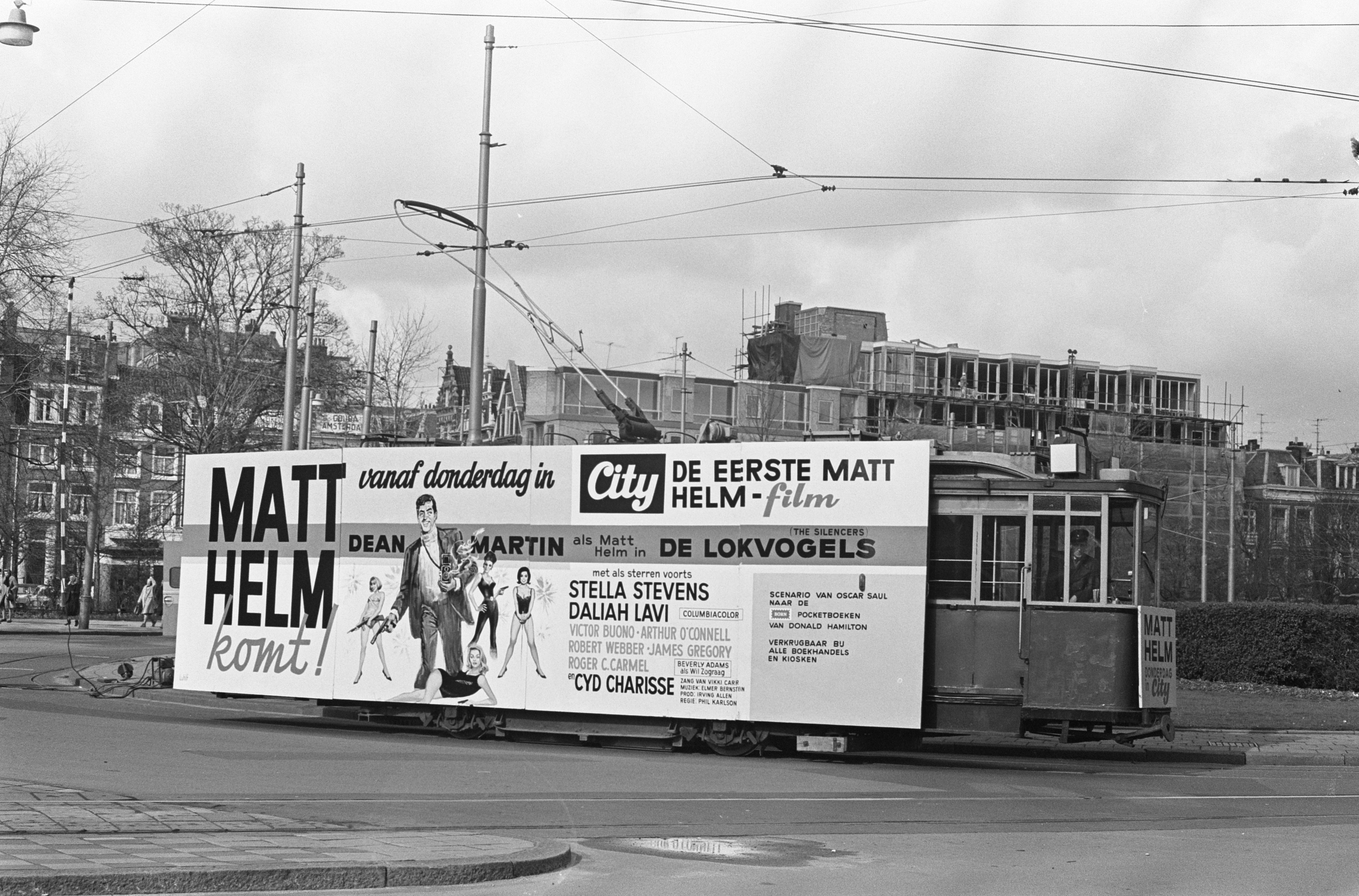 Collectie / Archief : Fotocollectie Anefo Reportage / Serie : [ onbekend ] Beschrijving : Daliah Lavi , opdracht Columbia Datum : 29 maart 1966 Trefwoorden : aanplakbiljetten Persoonsnaam : COLUMBIA, Daliah Lavi Fotograaf : Nijs, Jac. de / Anefo Auteursrechthebbende : Nationaal Archief Materiaalsoort : Negatief (zwart/wit) Nummer archiefinventaris : bekijk toegang 2.24.01.05 Bestanddeelnummer : 918-9758